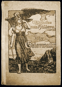 Buch: Die Geier-Wally von Wilhelmine von Hillern, vorderer Umschlagdeckel